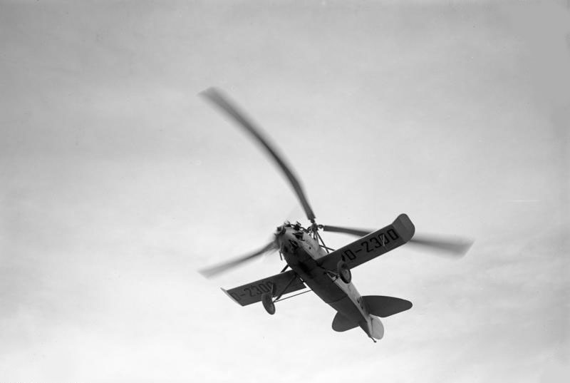 Das erste deutsche "Autogiro" (Windmühlenflugzeug) der Focke-Wulf-Werke, wurde in Berlin-Tempelhof gezeigt ! Das erste deutsche "Autogiro" bei seinem Flug über den Zentralflughafen Berlin-Tempelhof.